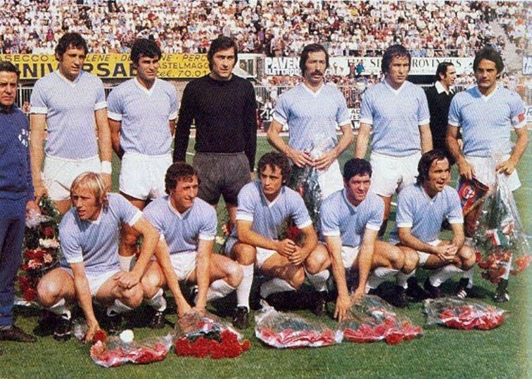 Bologna (Italia), stadio Comunale, 19 maggio 1974. La formazione della S.S. Lazio scesa in campo nella trasferta contro il Bologna F.C. (2-2) valevole per la 30ª e ultima giornata del campionato italiano di Serie A 1973-74.